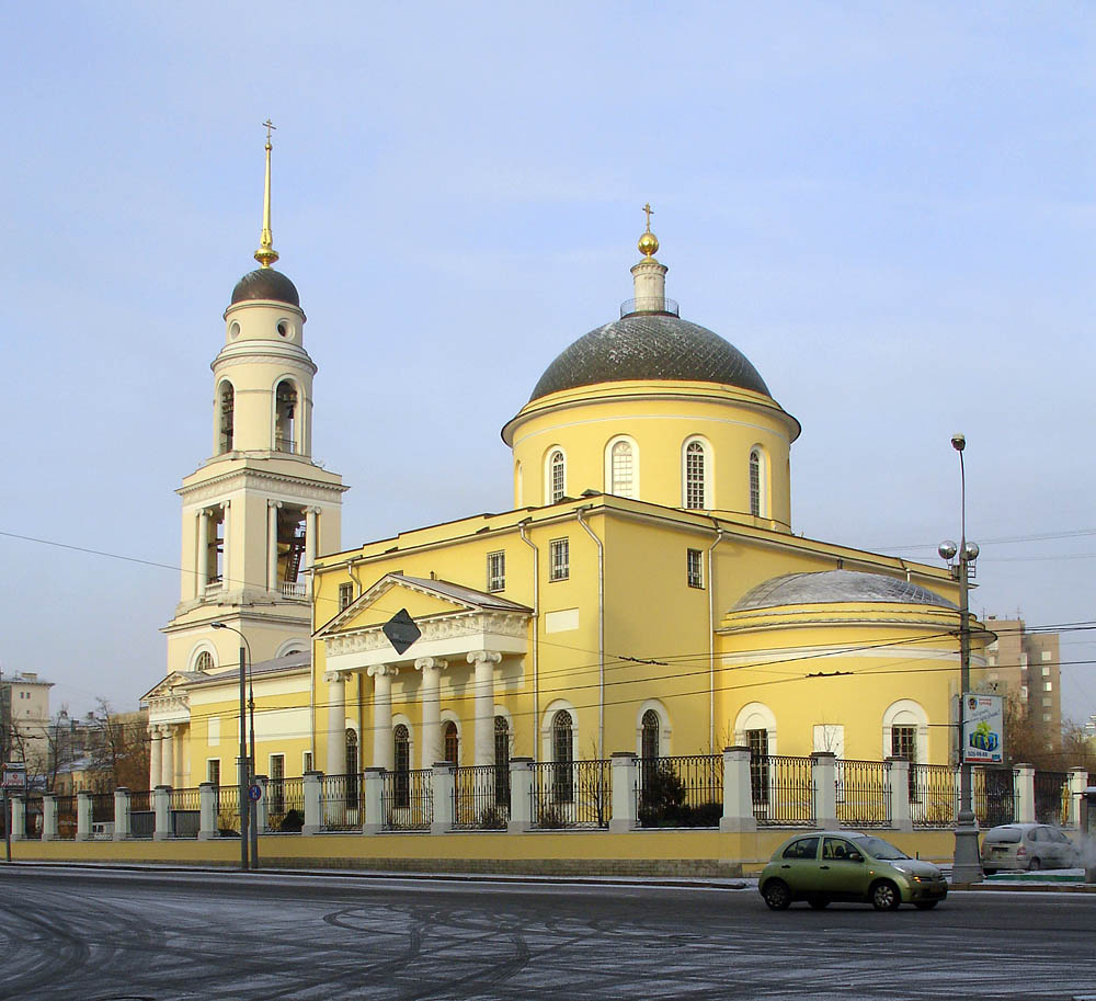 Moscow, Nikitskie GatesМосква, церковь Большое Вознесение у Никитских Ворот